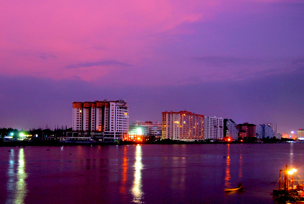 Skyline at Marine Drive, Kochi, Kerala